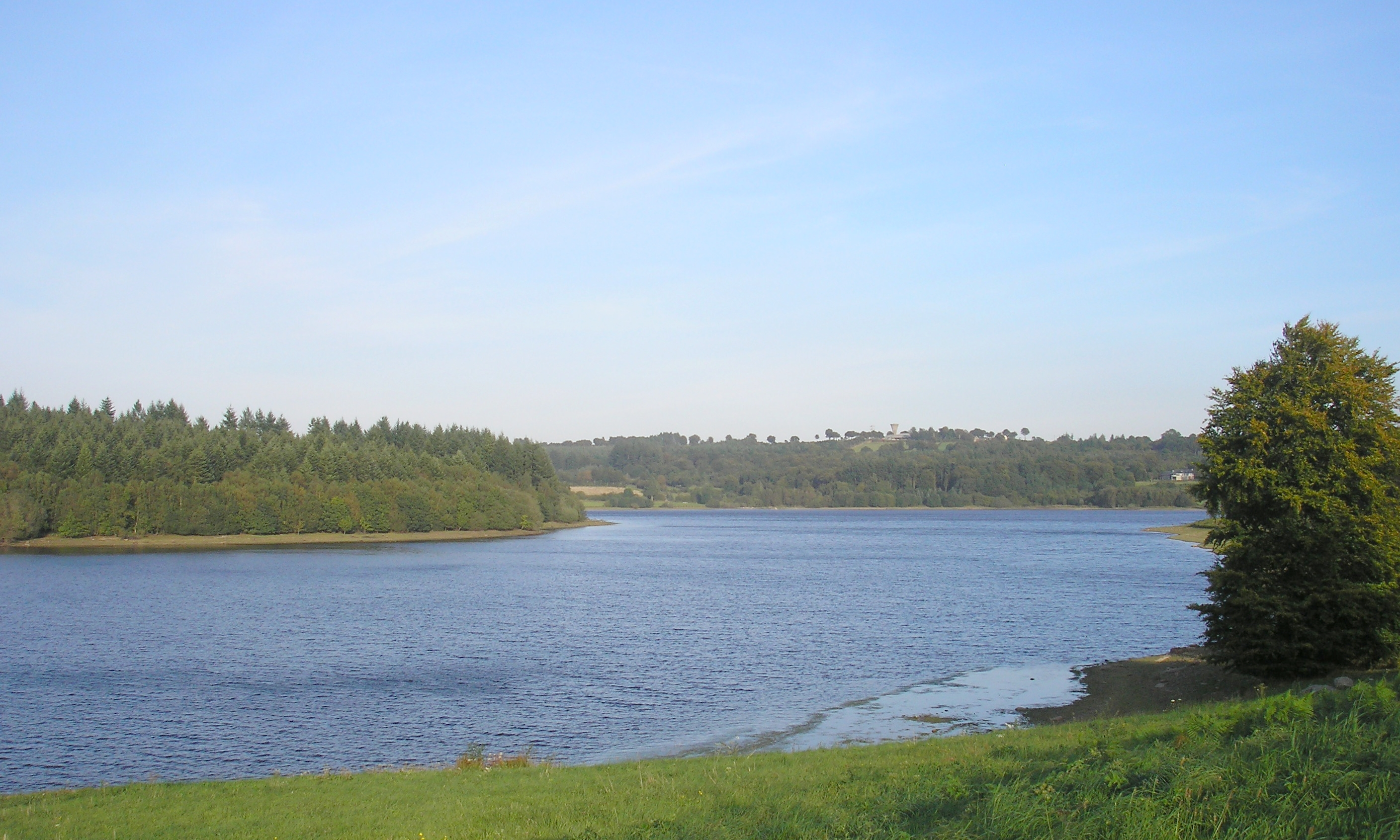 Saint-Sever-Calvados et Le Gast (Normandie, France). Le lac du Gast.